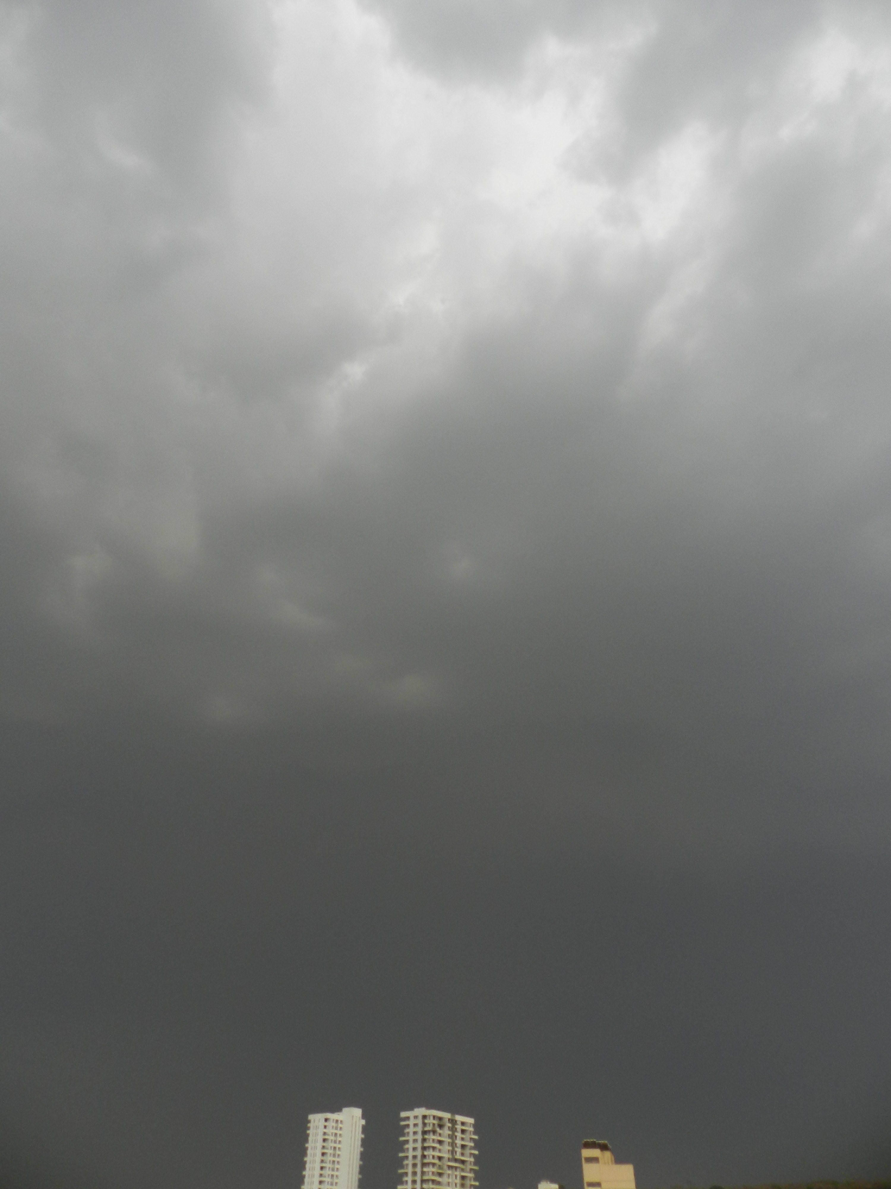 १३ एप्रिल २०१९ ला पुण्याच्या आकाशात जमा झालेले गर्जन्मेघ